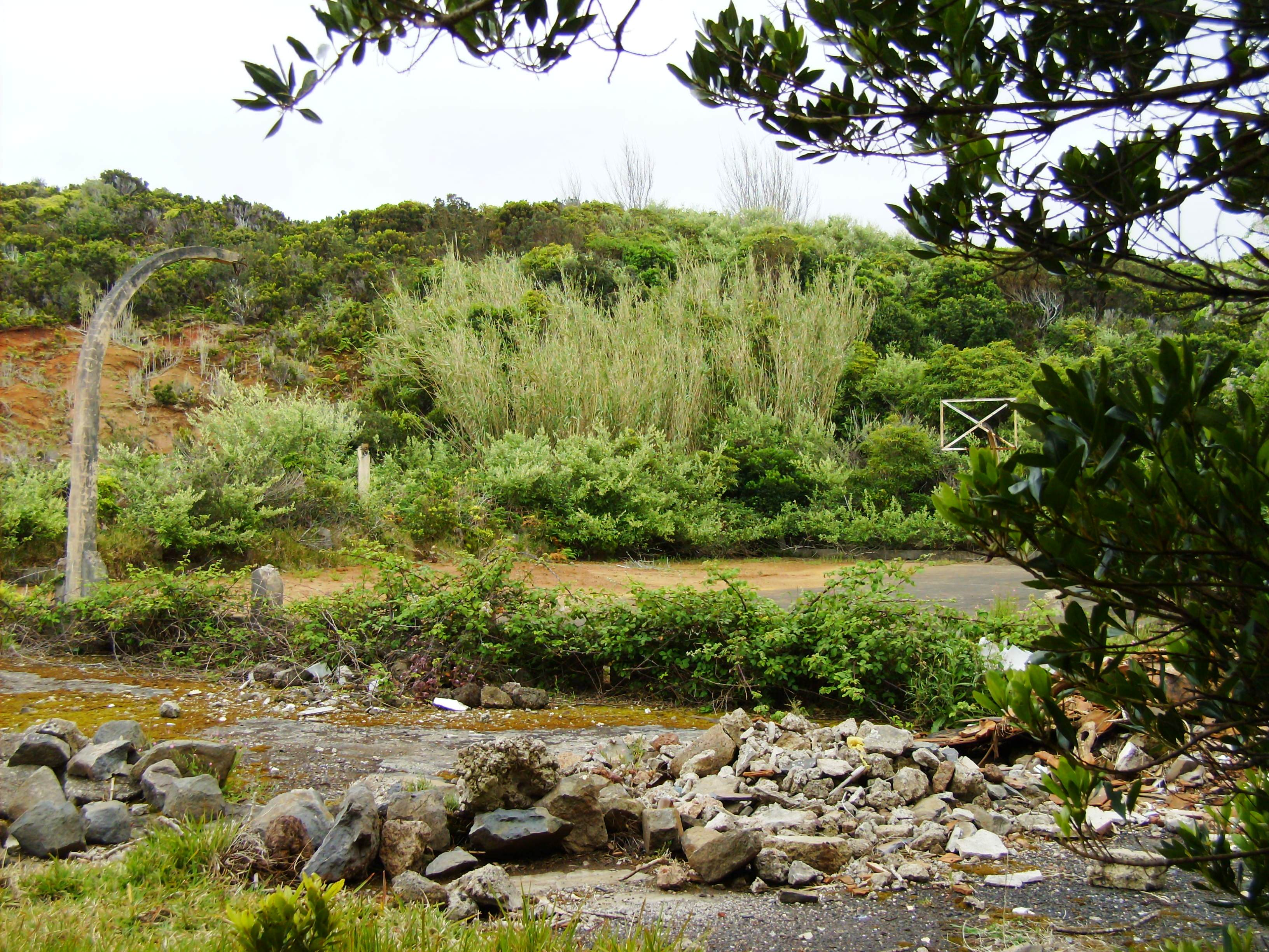 Estação LORAN de Santa Maria, Ilha de Santa Maria (Açores), Portugal.